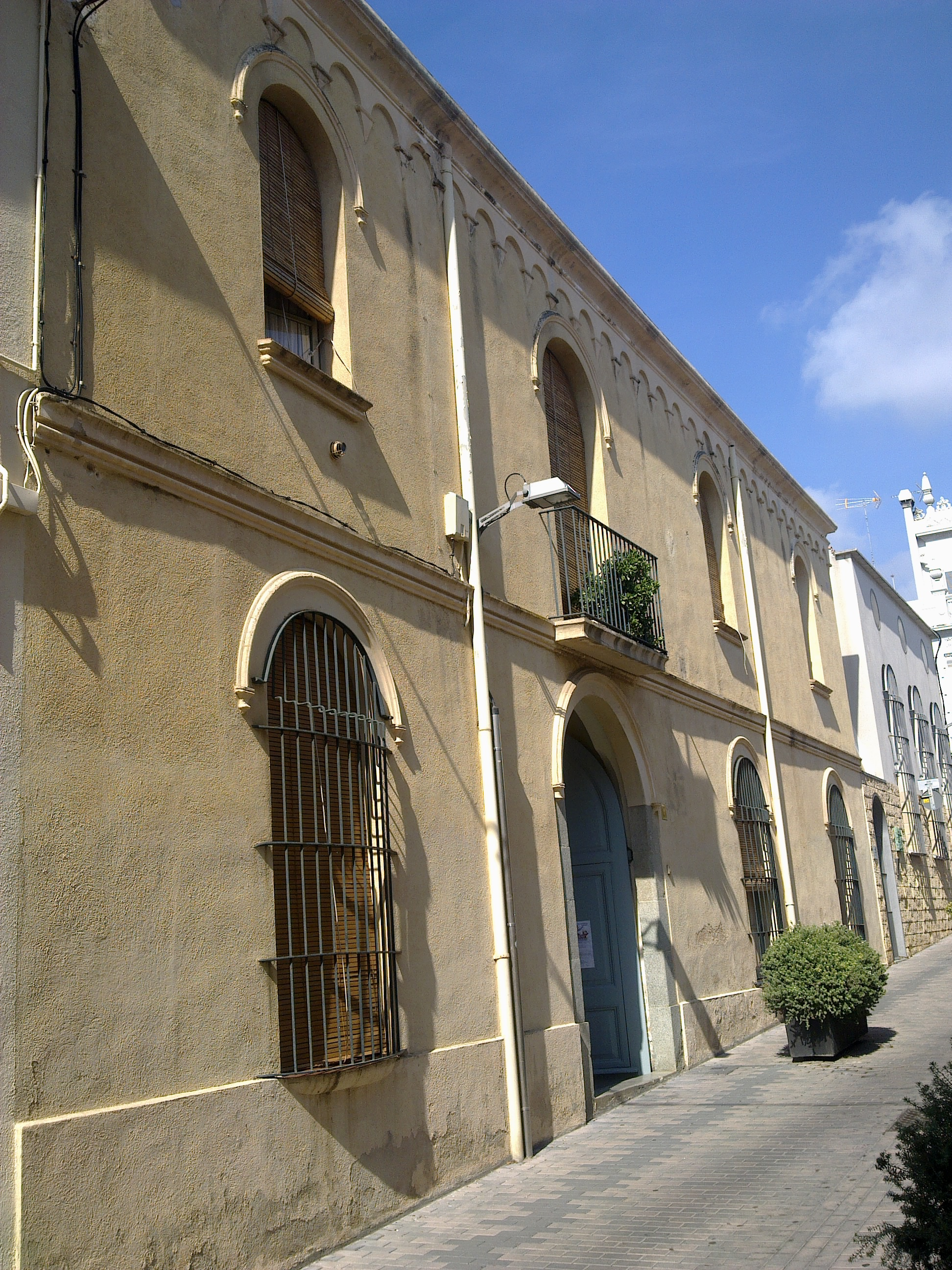 Rectoria de Premià de Mar (Maresme)